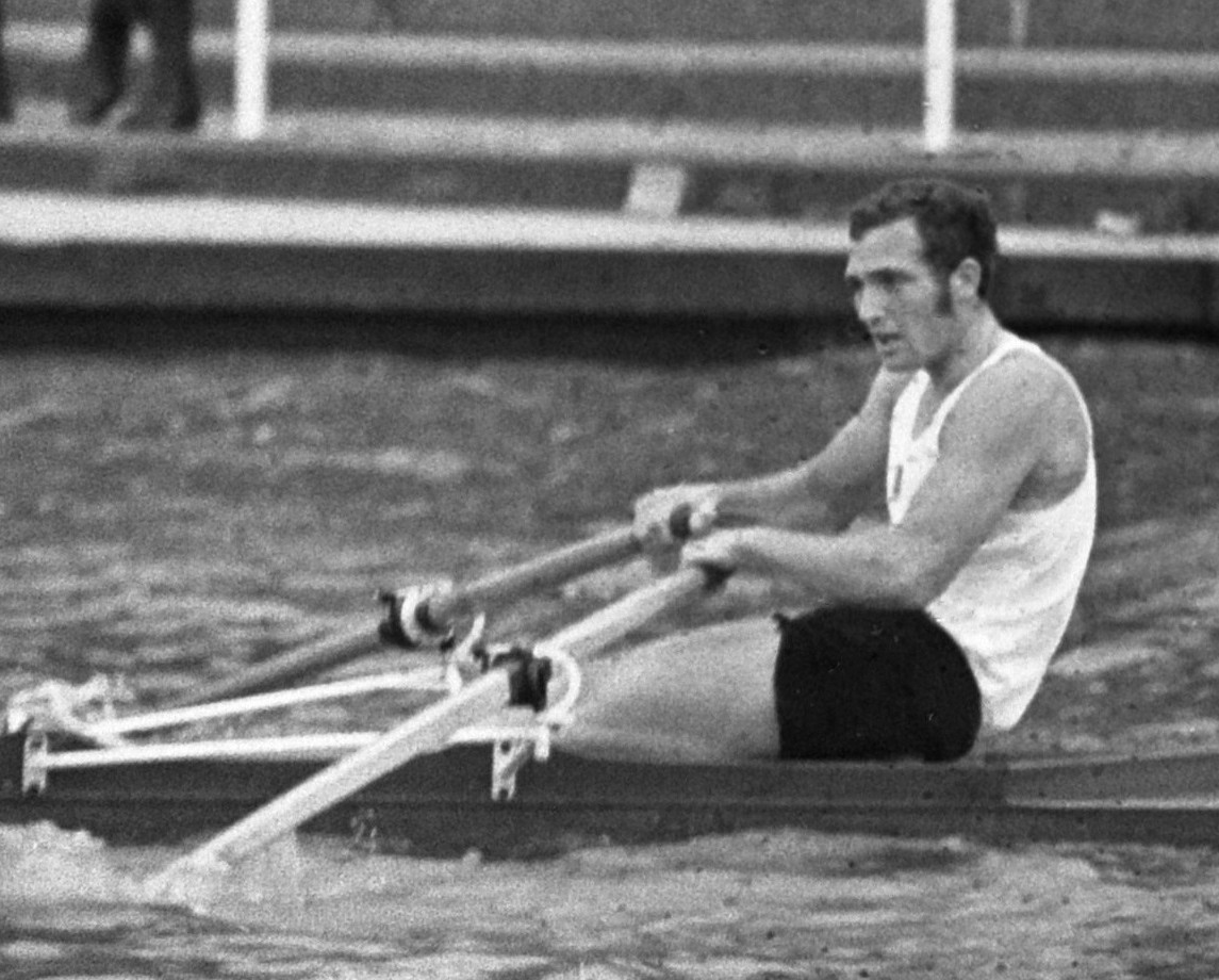 Internationale Bosbaanregatta; nr. 7a: skiffeur Bromek (Polen)